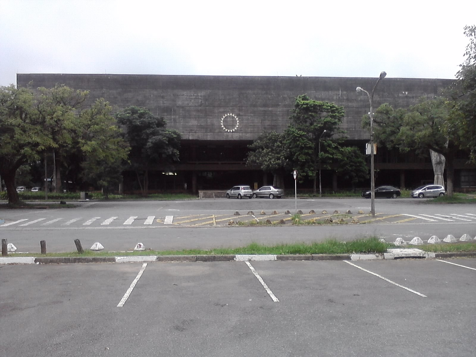 Fachada do prédio da Faculdade de Arquitetura e Urbanismo.